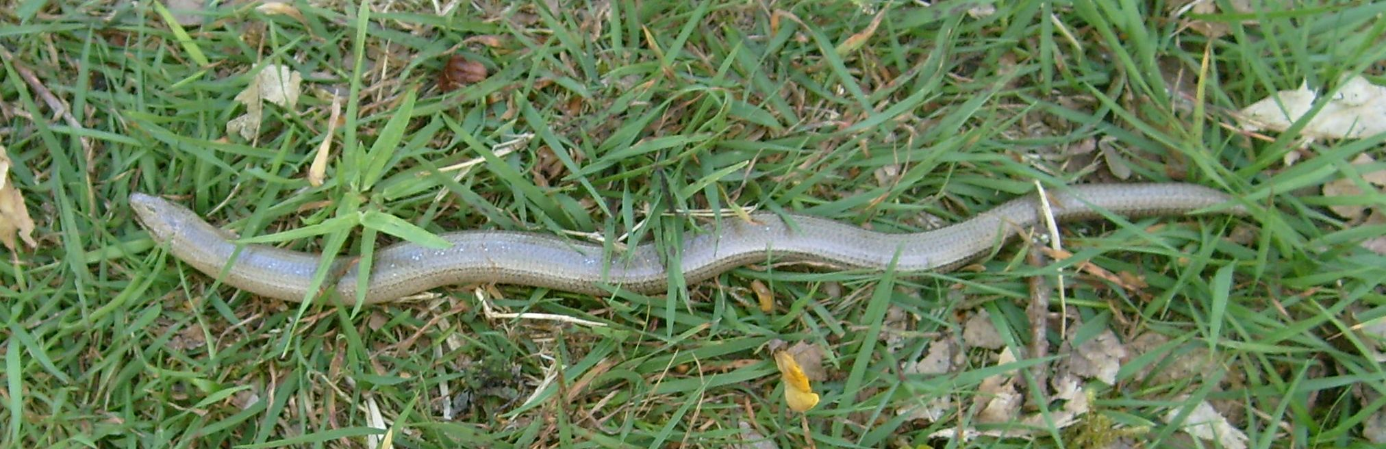 E Blannschlécher - Anguis fragilis L. - 11. Mee 2008.